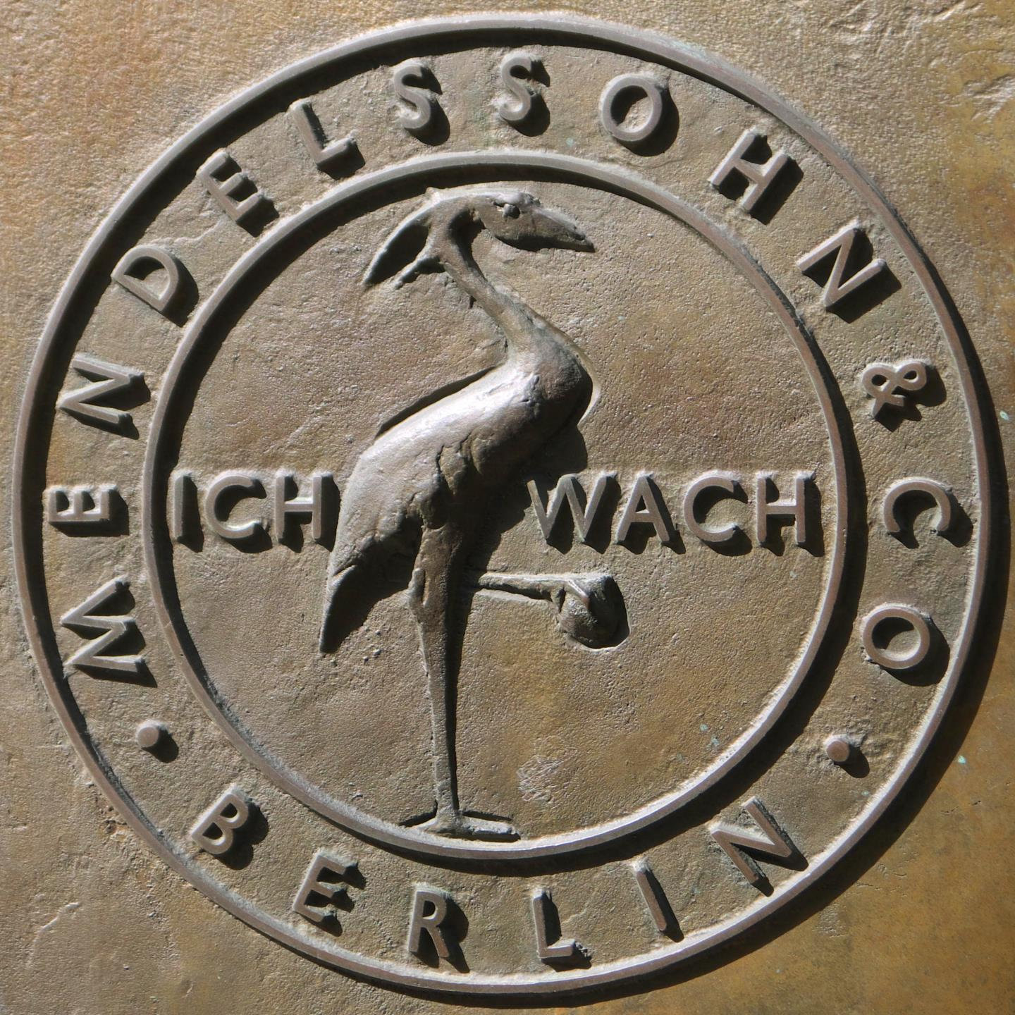 Bronzerelief in der Jägerstraße 51